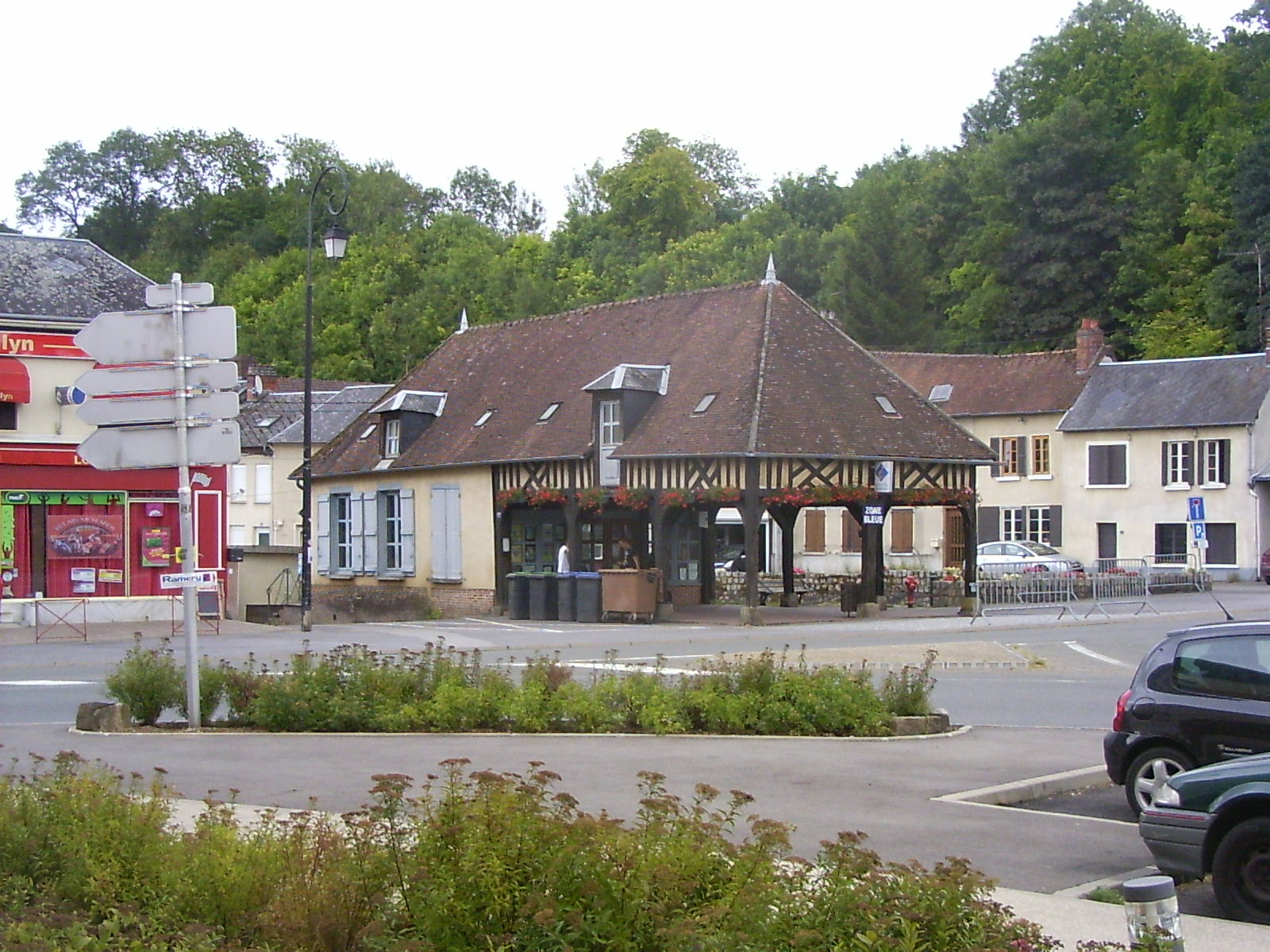 Marseille-en-Beauvaisis, VVV-kantoor